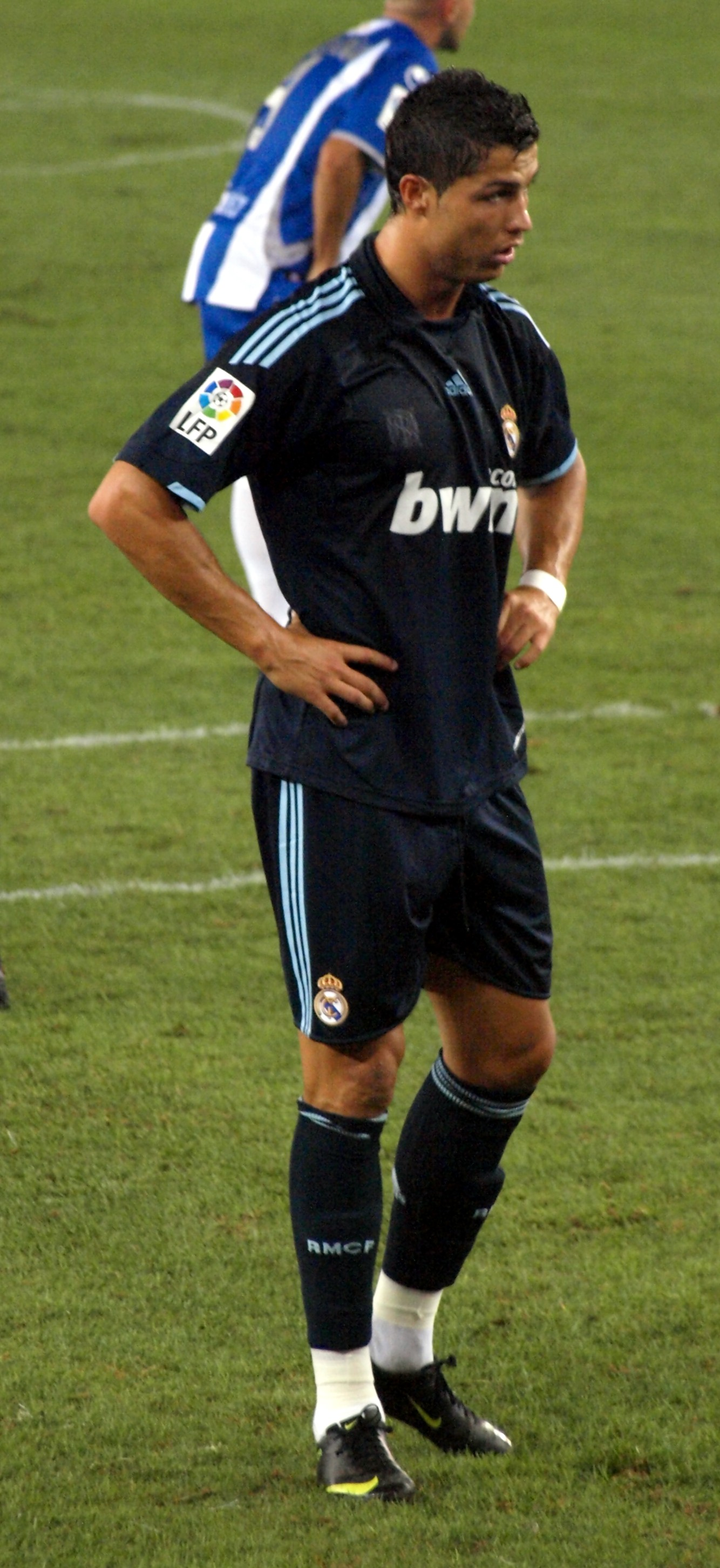 Cristiano Ronaldo en el partido que enfrentó al Real Madrid con el RCD Español en el Estadio de Cornellá-El Prat de la primera vuelta de La Liga 2009/10.